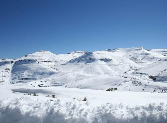 Jaco van Tonder